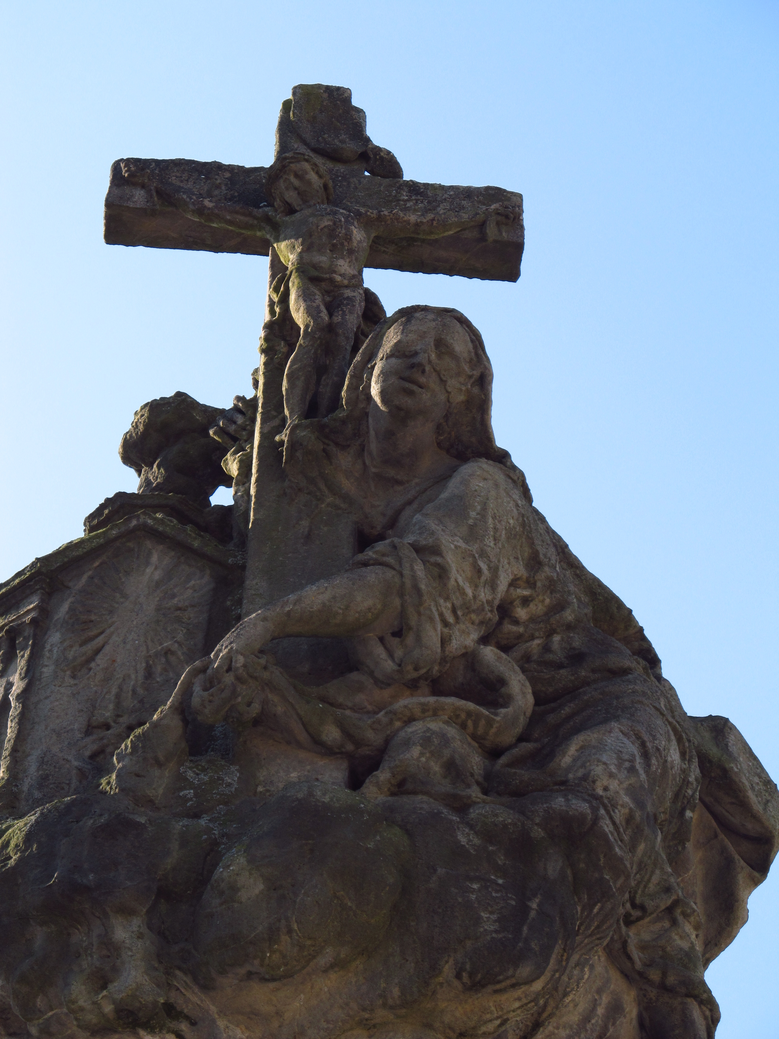 Sousoší Víry se sochami sv. Jana a sv. Pavla (Hodkovice nad Mohelkou), u č. e. 16, Hodkovice nad Mohelkou